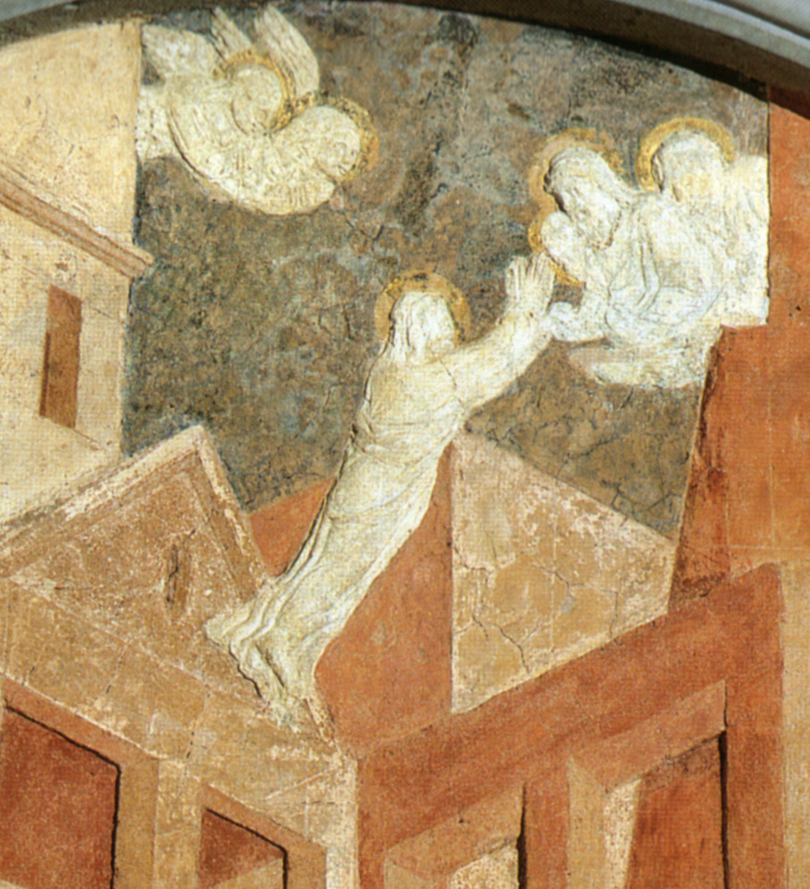 Donatello, storie di san giovanni evangelista, ascensione di s.g., 1434-43 dettaglio2